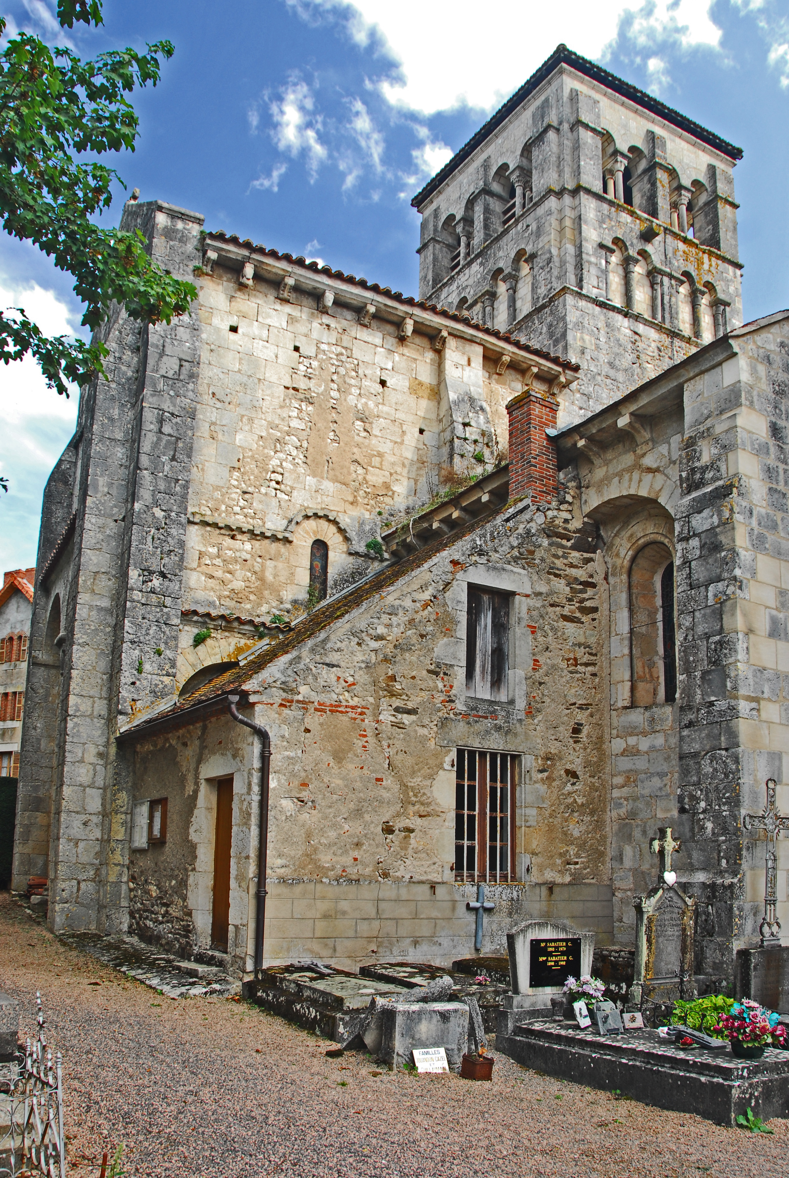 Ste-Croix de Veauce, Nordseite, Lang- u. Querhaus